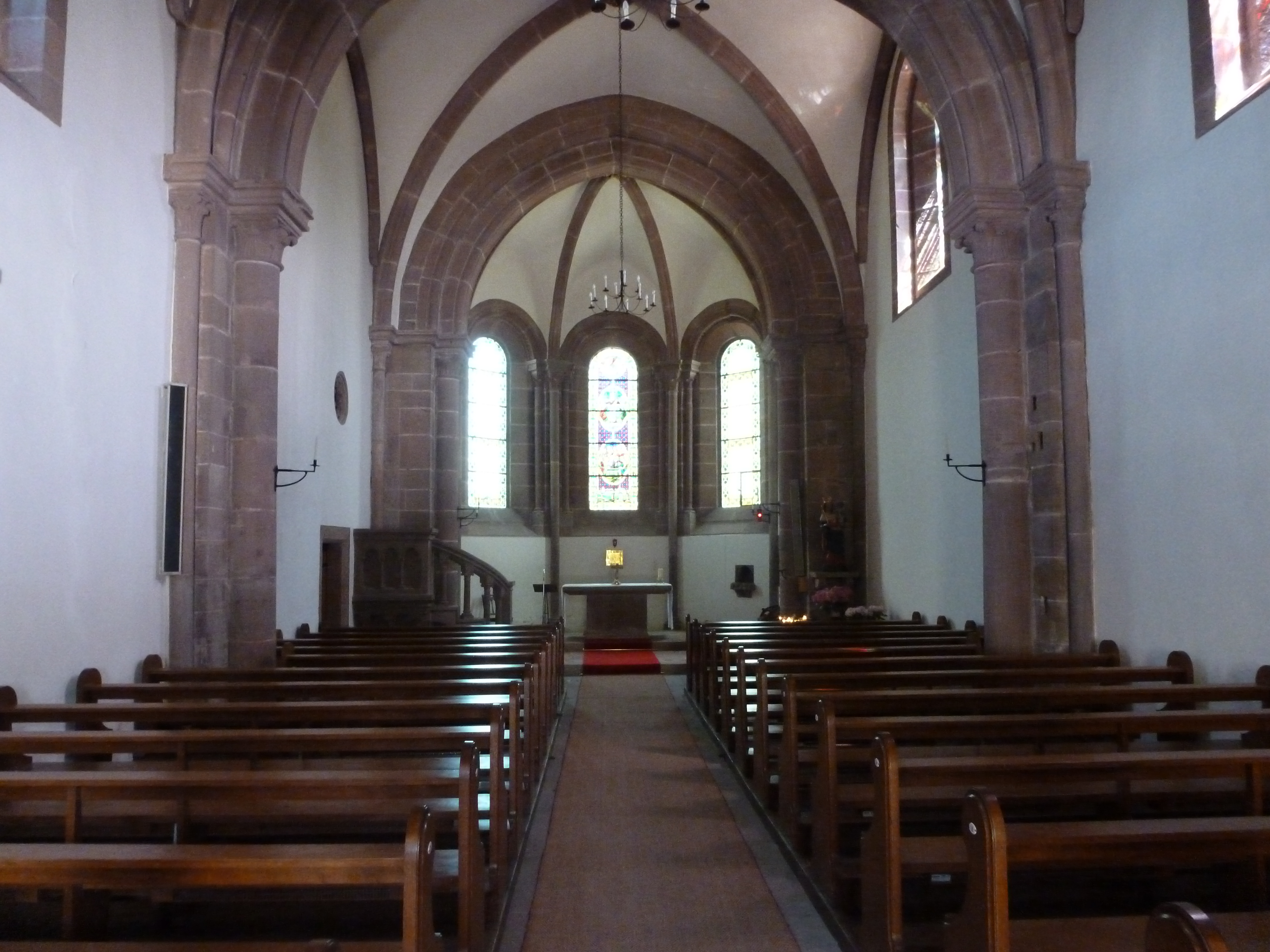 Chapelle Sainte Marie de l’Assomption, bâtie au XIIIème siècle, à Obersteigen (commune de Wangenbourg-Engenthal, Bas-Rhin, Alsace). Intérieur de la chapelle.